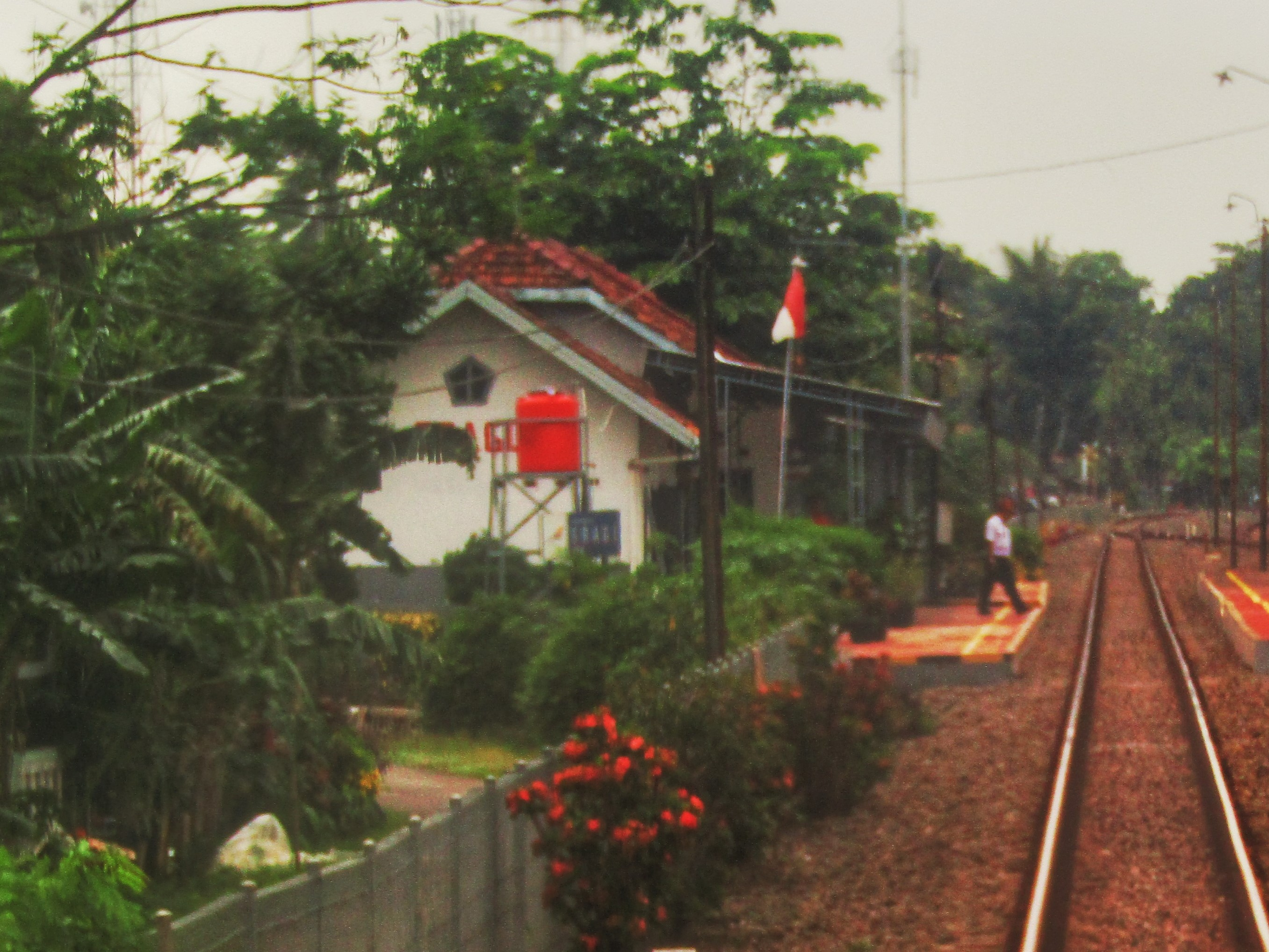 Tampak peron bangunan Stasiun Sragi, 2019, dengan PPKA tunjuk-sebut Semboyan 1.